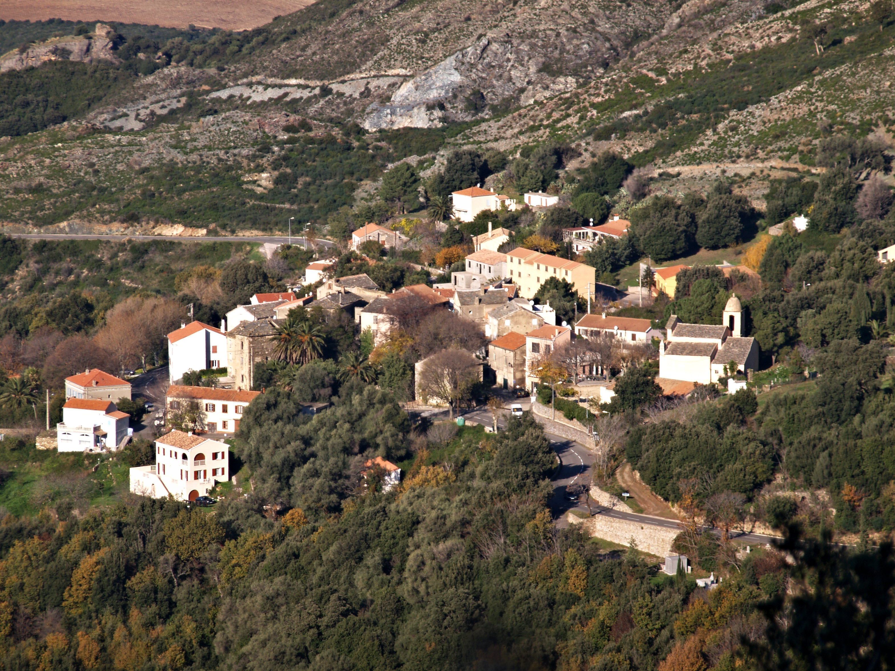 Barbaggio (Corse) - Hameau de Piazze (Déc. 2006)